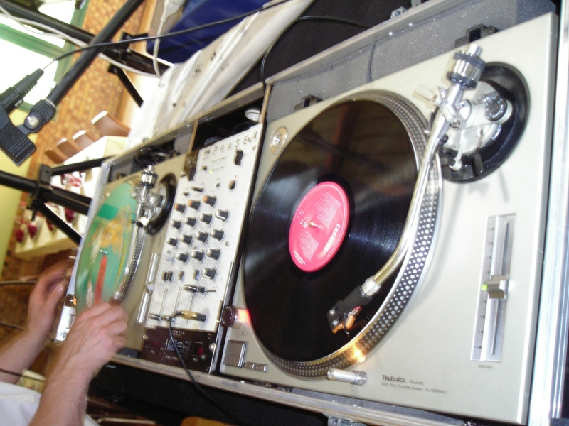 Platines vinyles